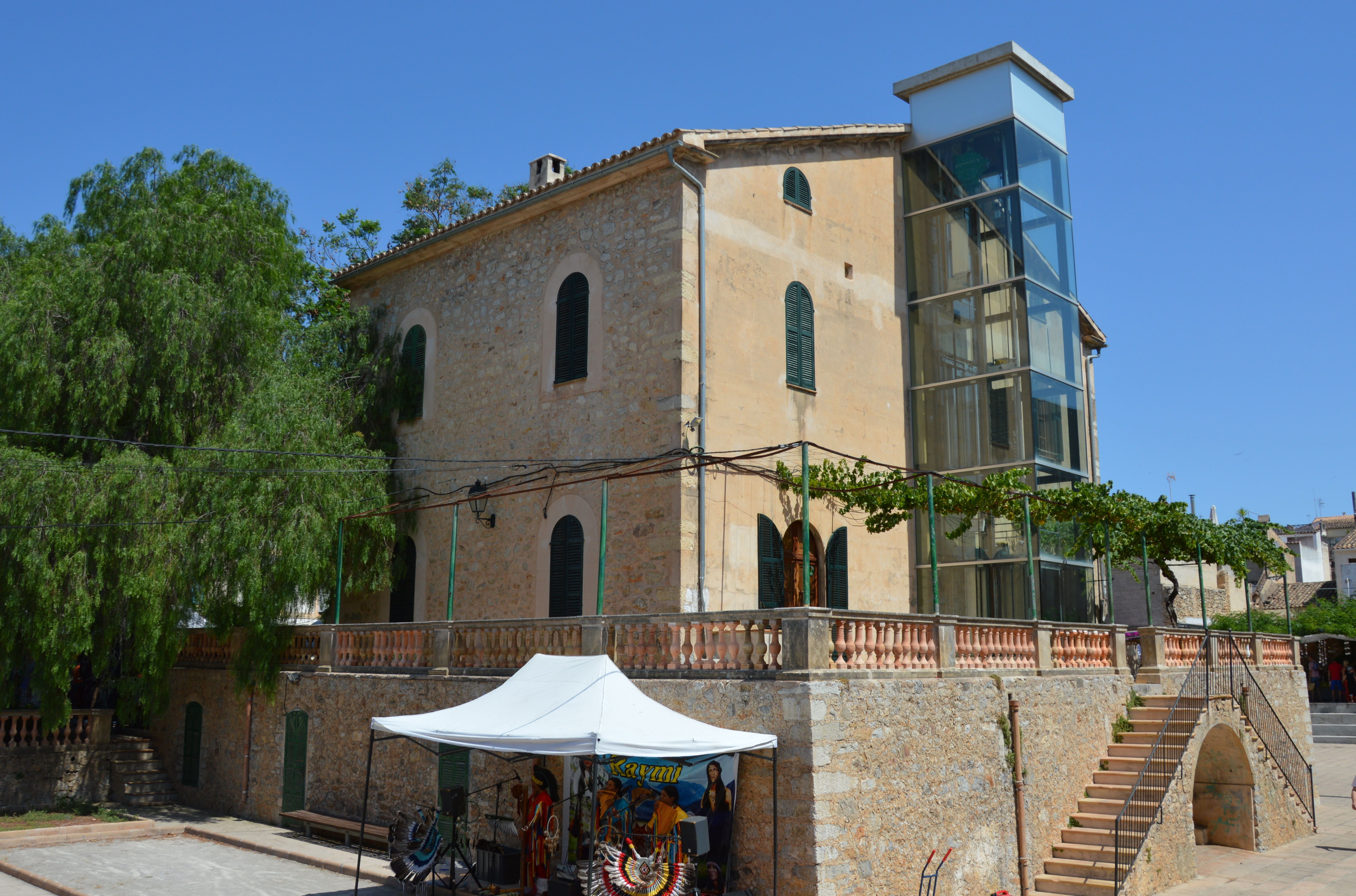 Haus Na Batlessa in Arta